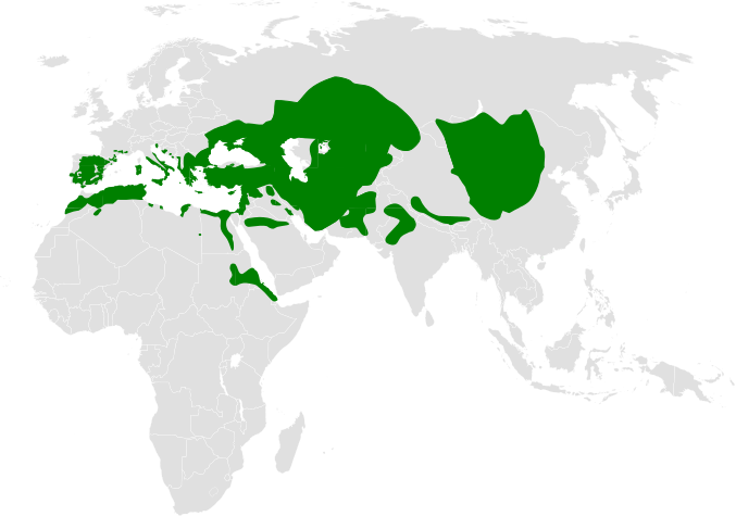 Melanocorypha distribution map